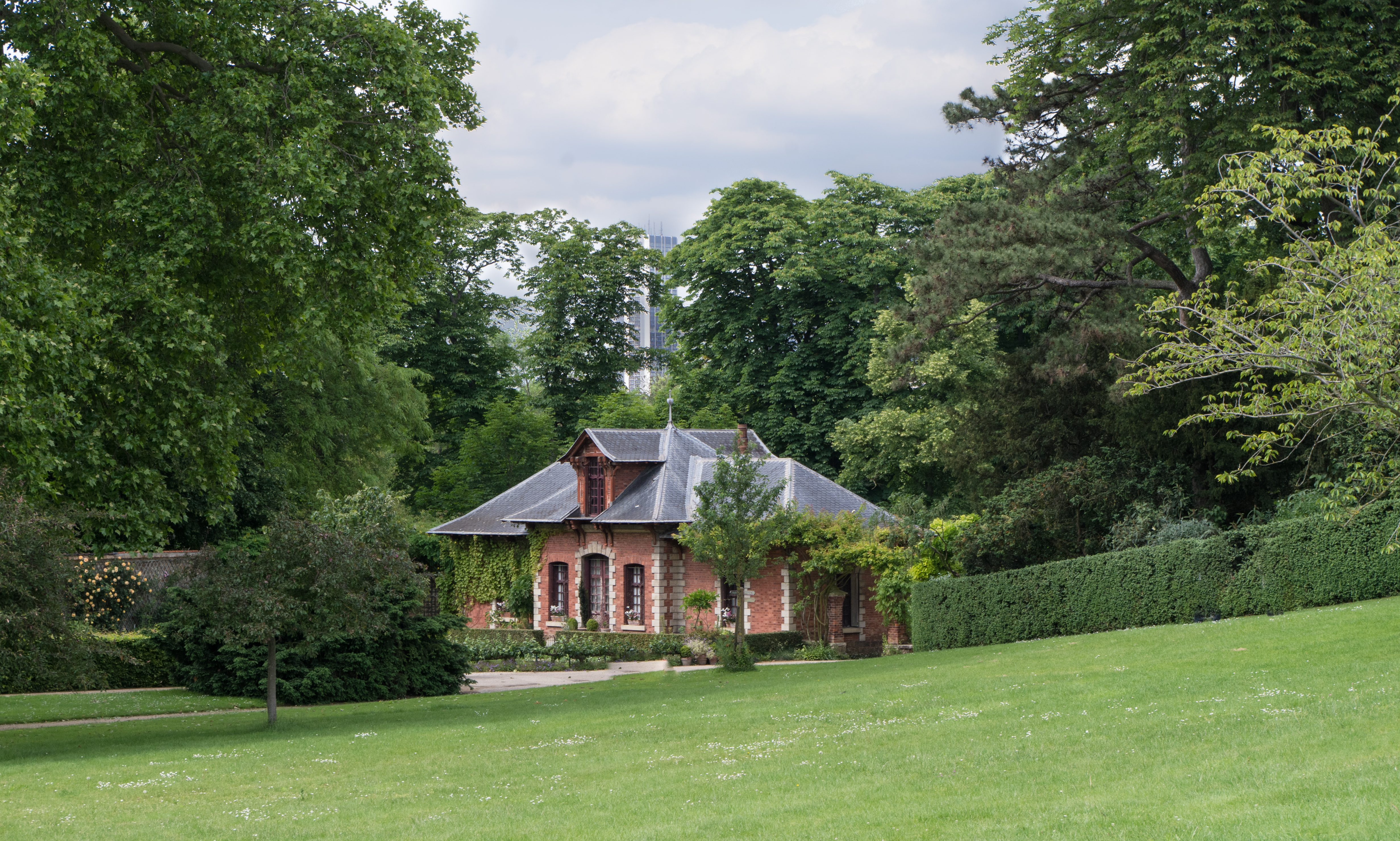 Vue sur la maison du jardinier au parc de Bagatelle